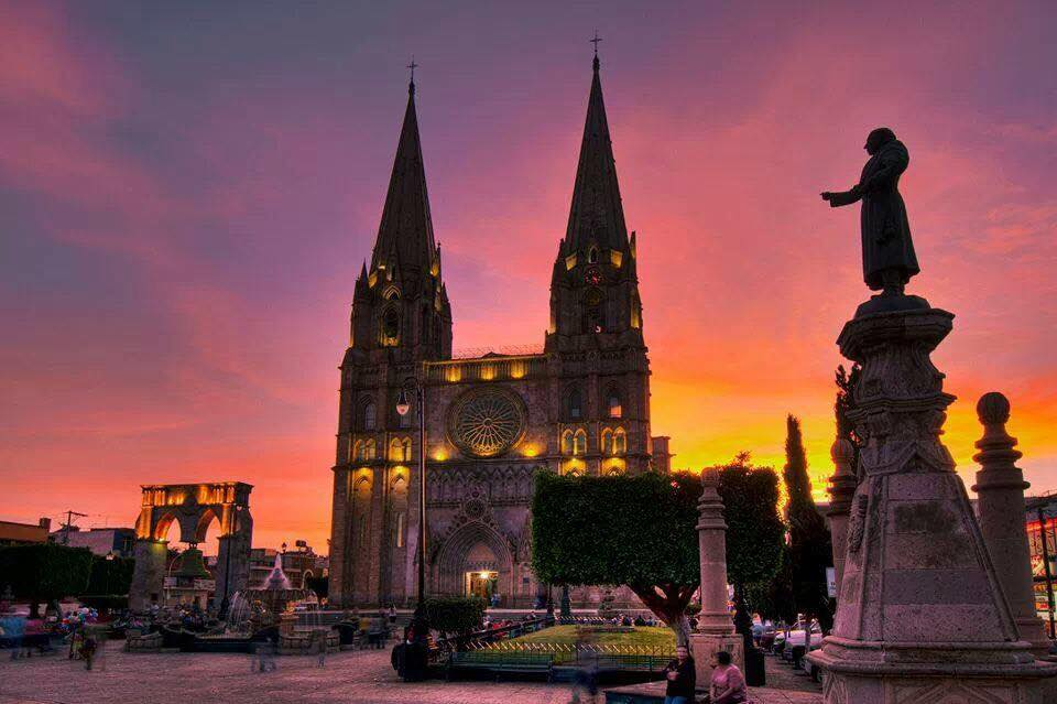 Atardecer en el parque Hidalgo, Arandas Jalisco. Aqui se ubica el templo de San jose Obrero y el campanil de La reina del Silencio